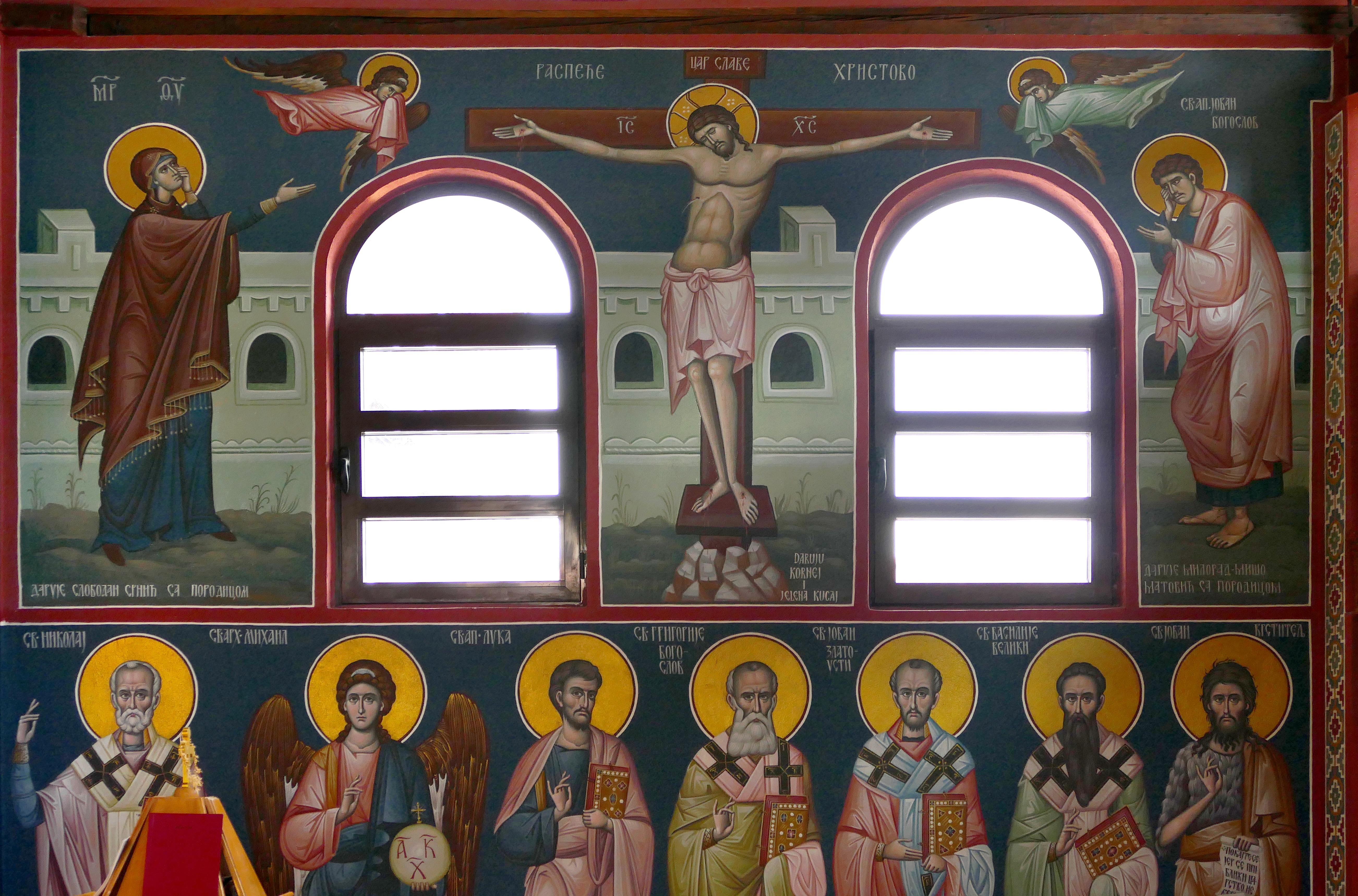 Alsace, Bas-Rhin, Strasbourg-Koenigshoffen, Église orthodoxe serbe Saint-Georges, 2A rue du Donon.